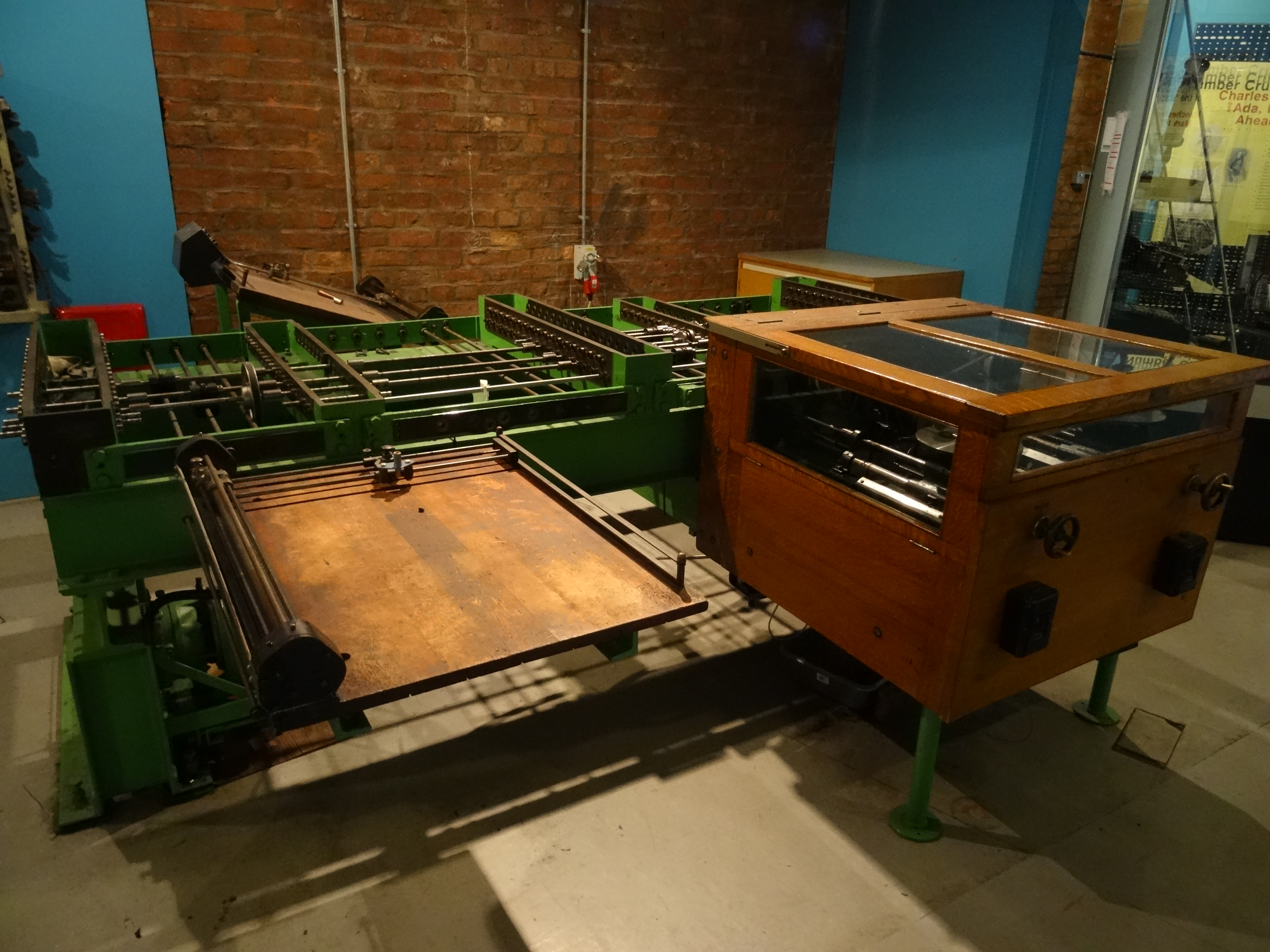 Analyseur différentiel exposé au Museum of Science and Industry de Manchester.